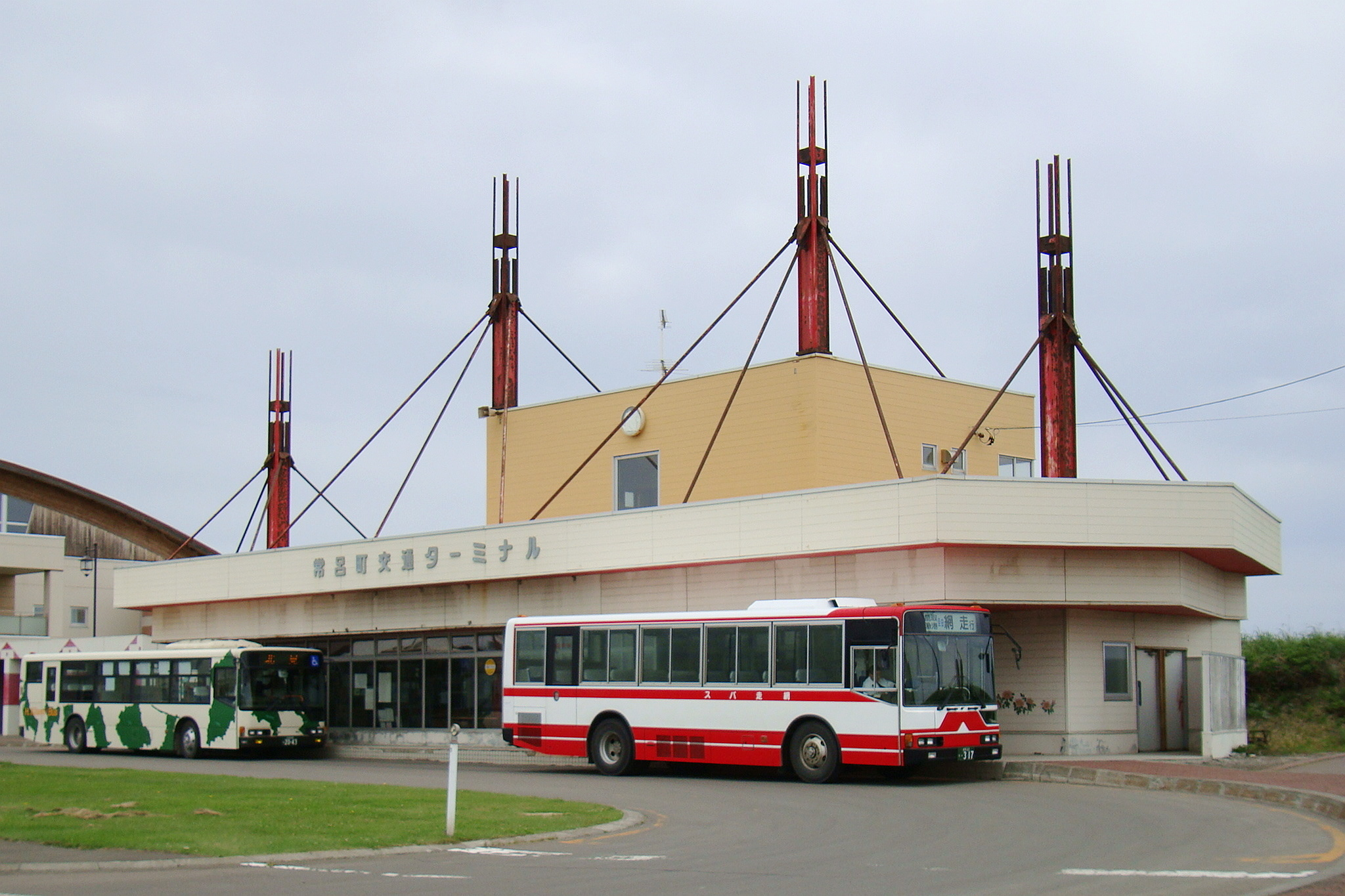 Tokoro depot